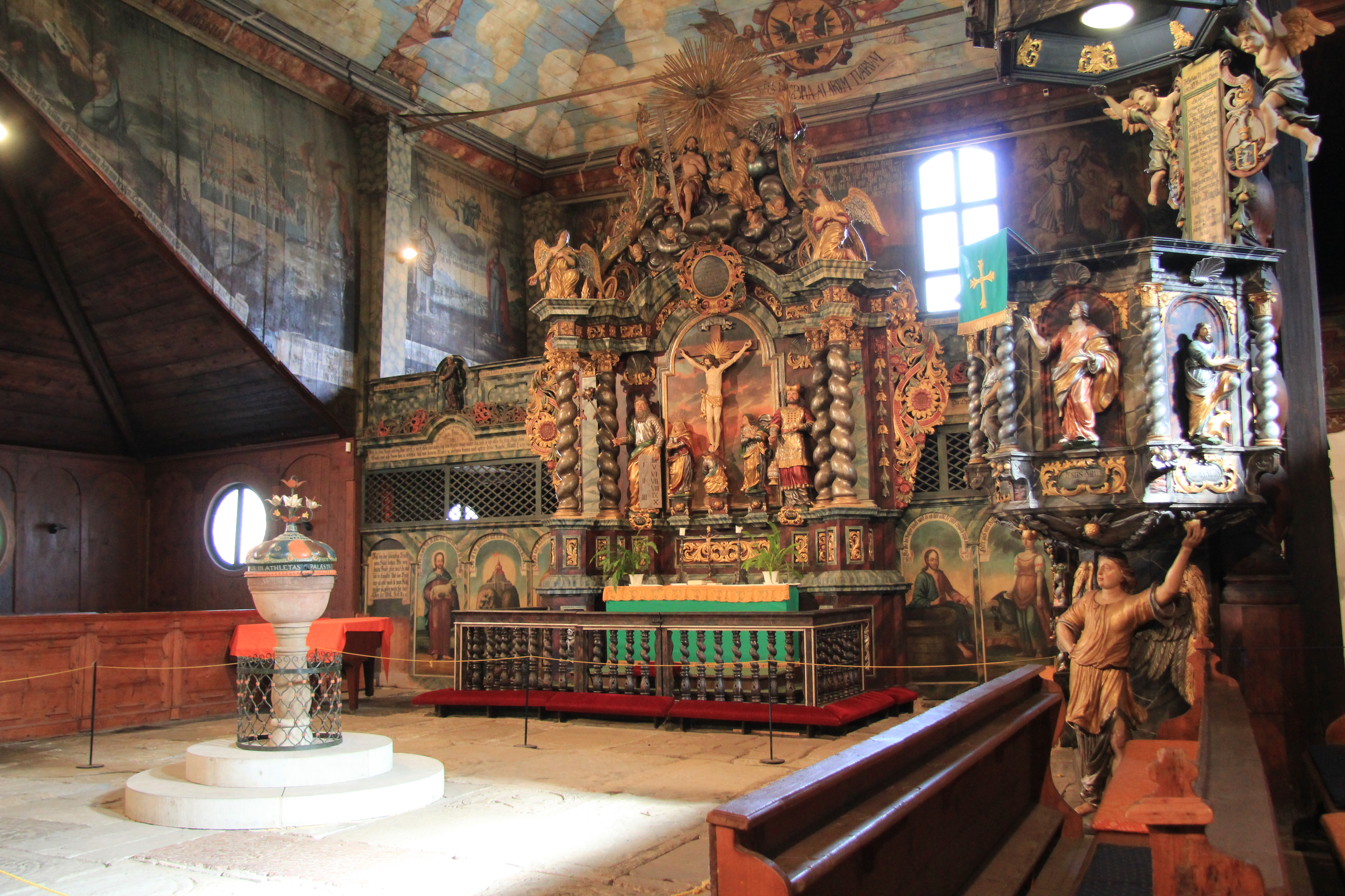 Holzkirche in Kežmarok